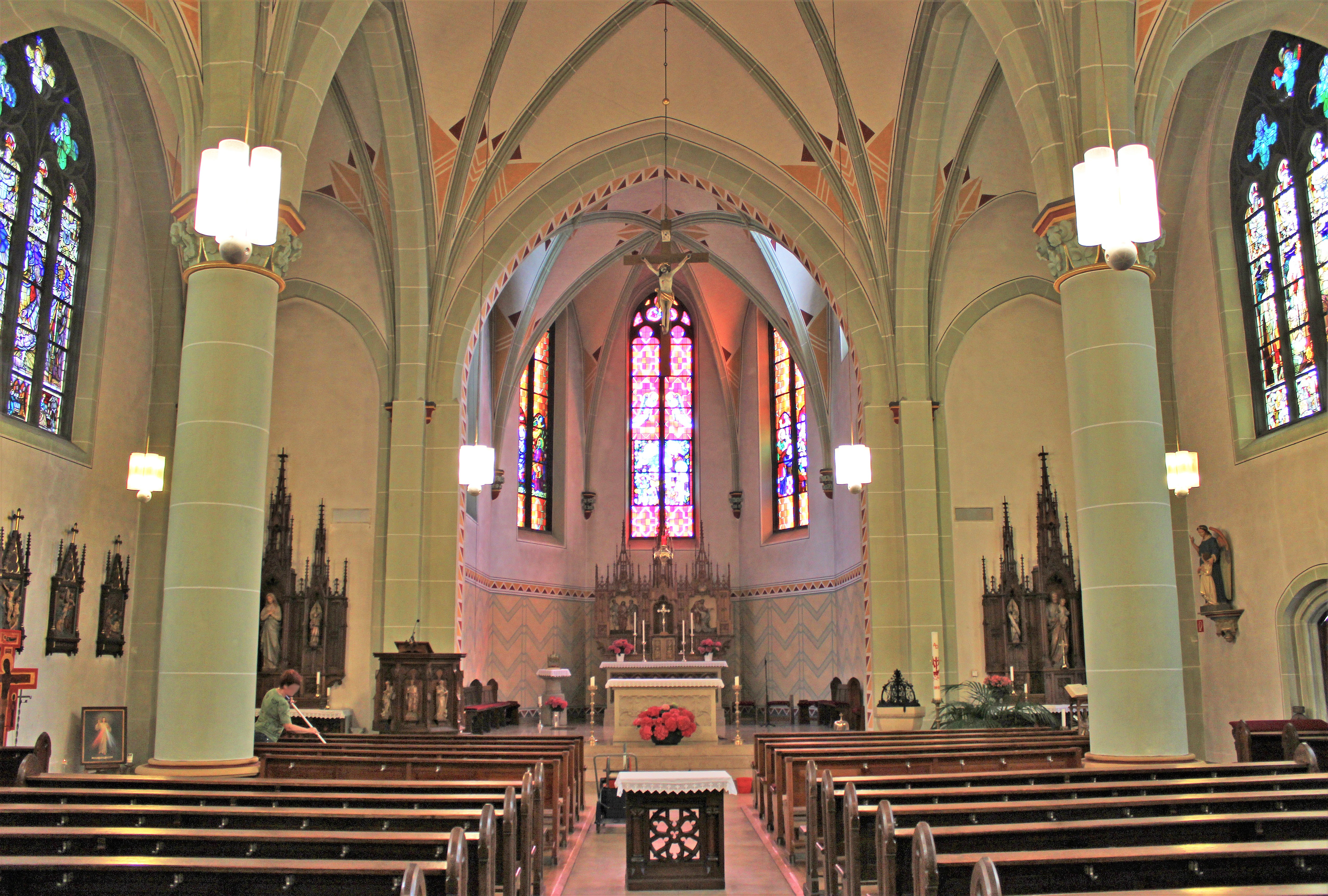 Blick ins Innere der katholischen Pfarrkirche St. Josef in Elm-Derlen, einem Ortsteil der Gemeinde Schwalbach, Landkreis Saarlouis, Saarland